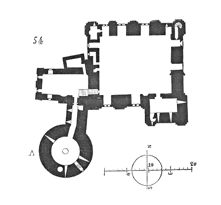 ... En Normandie, où la domination anglaise, au commencement du XVee siècle, fut contestée par une grande partie de la population, où il s'agissait non-seulement de protéger le pays contre des ennemis du dehors, mais de se garder contre ceux du dedans, les rares fortifications que les Anglais ont élevées ont un tout autre caractère. Elles tendent à augmenter et à renforcer les places importantes, afin d'avoir des garnisons nombreuses centralisées sur certains points stratégiques. C'est ainsi que le château de Falaise, dont la position était si importante, fut renforcé pendant la domination anglaise, c'est-à-dire de 1418 à 1450, par une grosse tour cylindrique qui formait une annexe au donjon normand du XIIe siècle (fig. 54). Le château de Falaise couvre une surface d'un hectare et demi ...